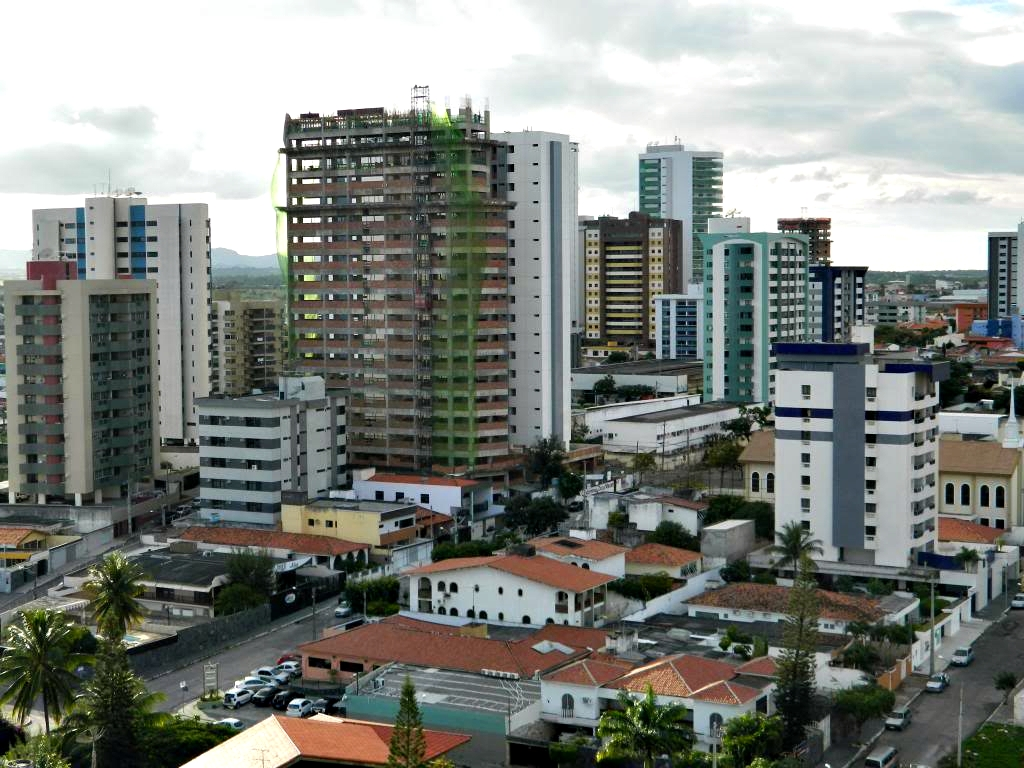 Caruaru, Pernambuco, Brasil.